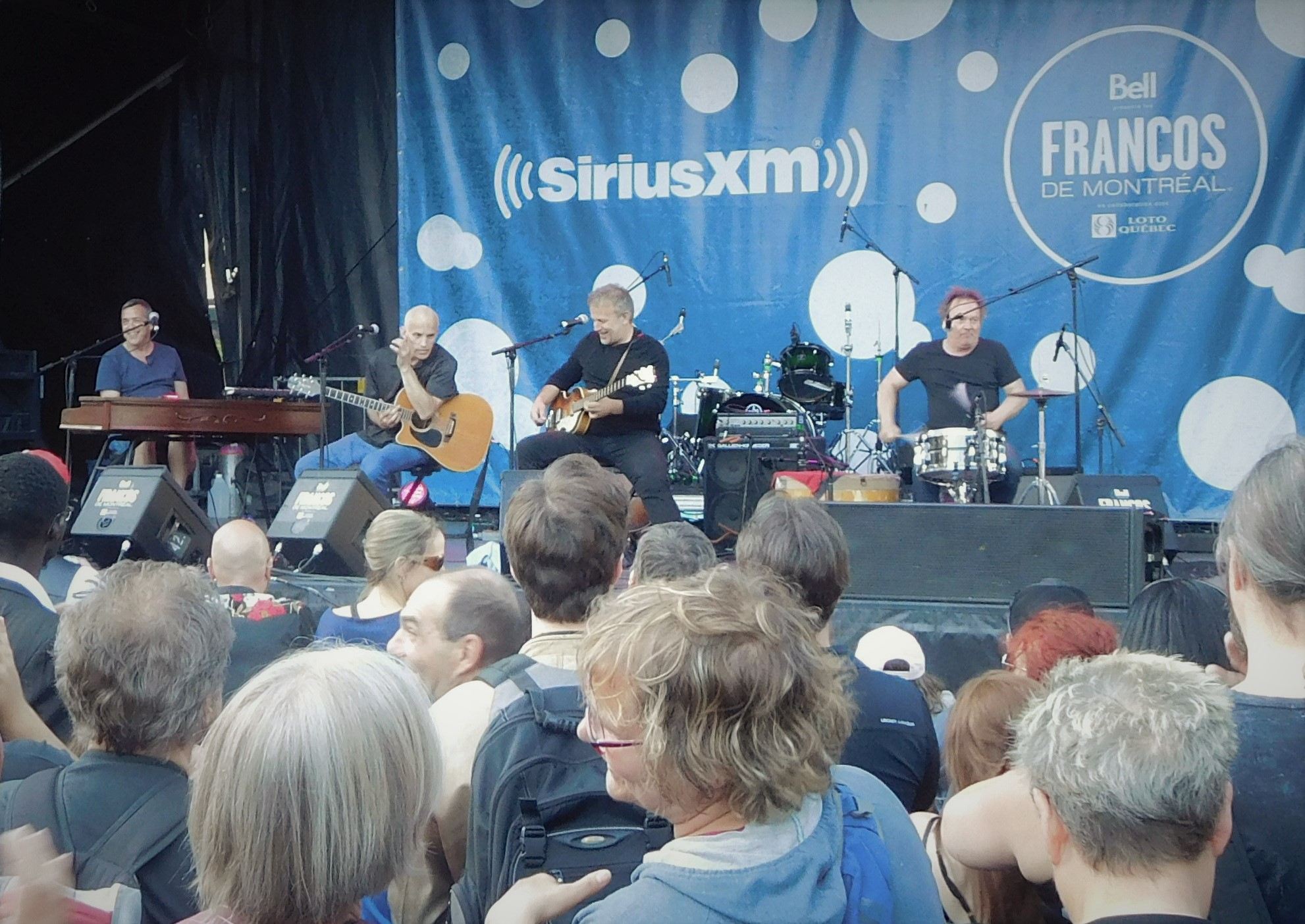 Le groupe Zébulon aux FrancoFolies de Montréal